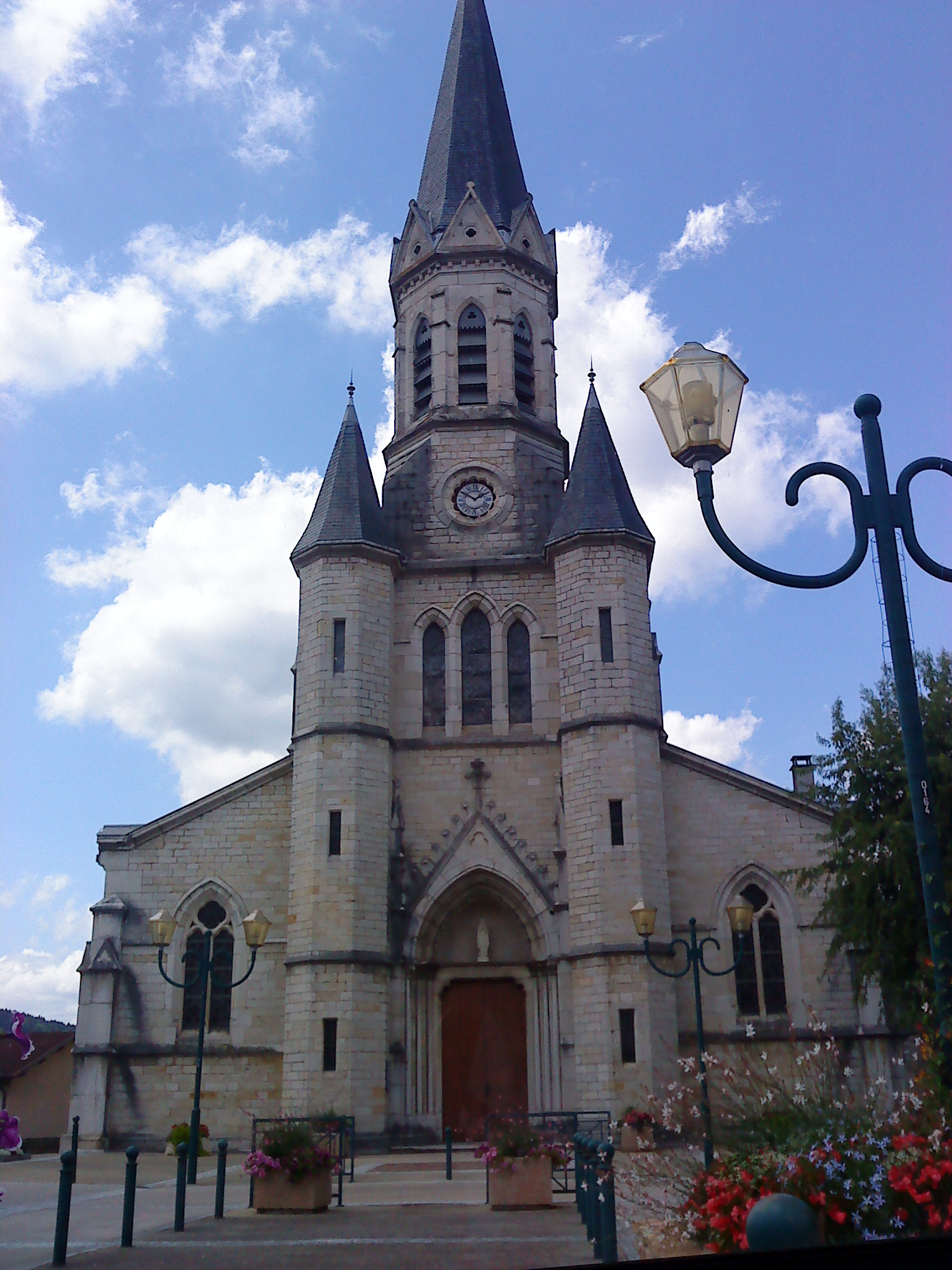 Église de la commune de Saint-Martin-du-Frene (Ain, France)